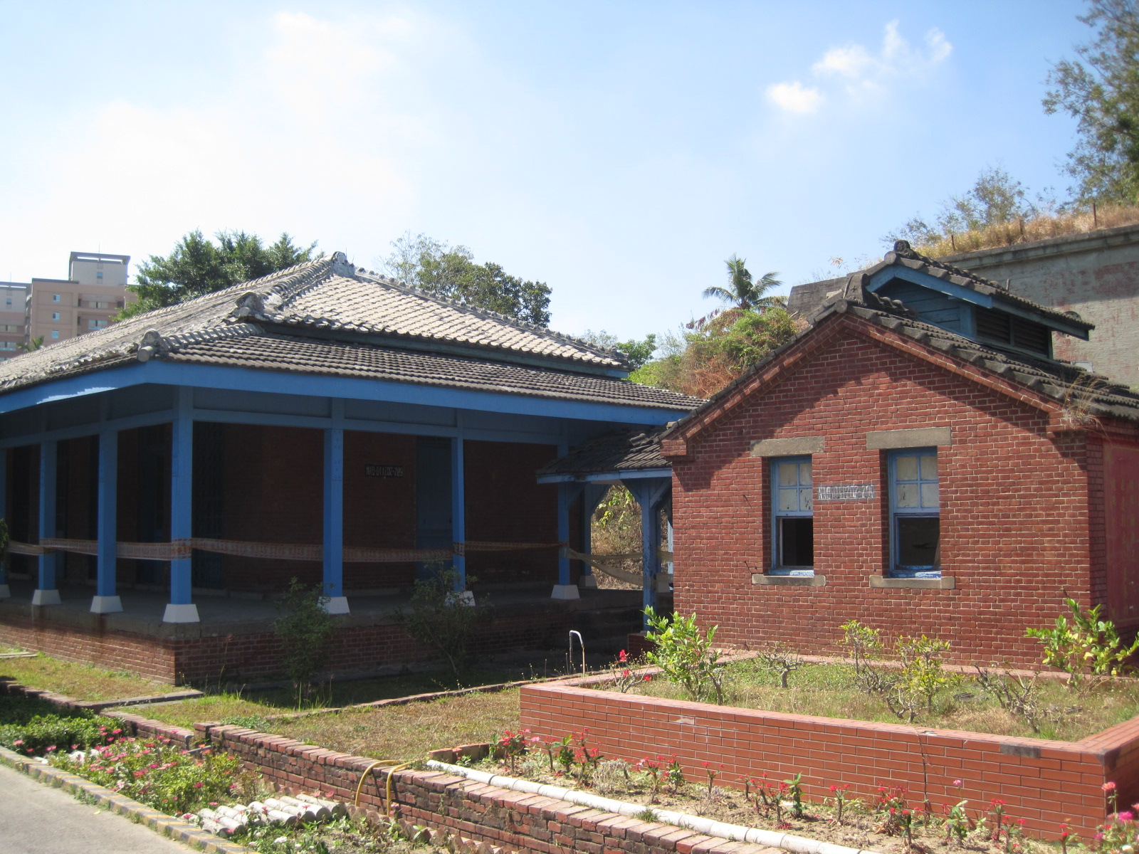 辦公廳舍及浴廁小屋